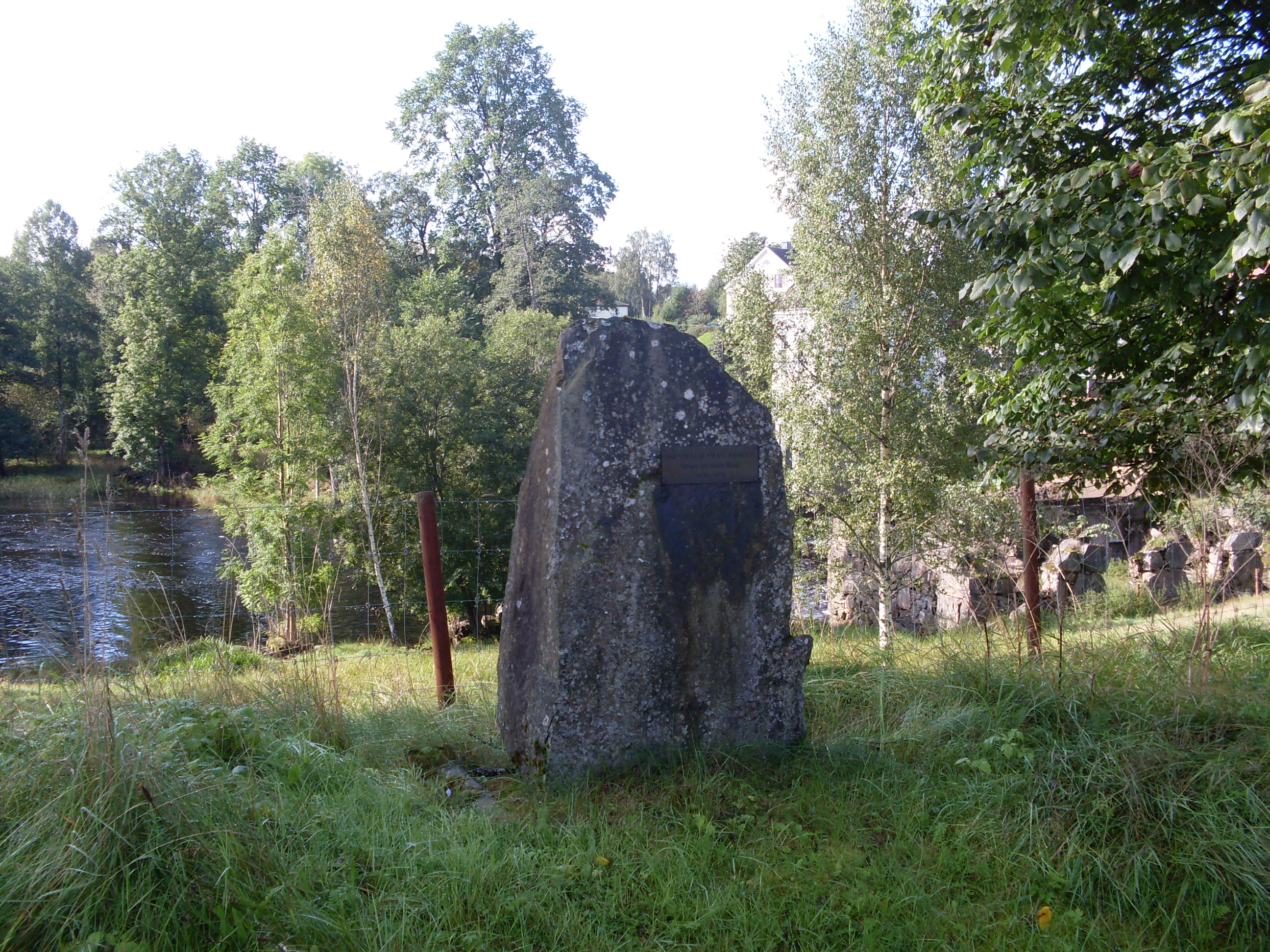 Minnessten vid Hörle Bruksherrgård. Malmstycke från Taberg.